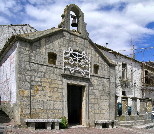 Panni (FG), 2006, Chiesa del Calvario